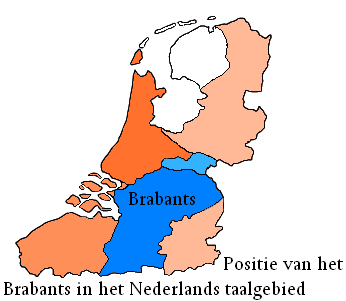 Description Positie van het Brabants in het Nederlands taalgebied. Date2006/2007SourceVertaling van nl::en:Image:BRABANTS.PNG (gemaakt en in het Publieke Domein geplaatst door Rex Germanus)AuthorRex GermanusPermission(Reusing this file) eigen werk Categorie:Afbeelding kaart Positie van het Brabants in het Nederlands taalgebied.